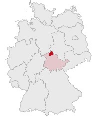 Landkreis Nordhausen, Thuringia, Germany